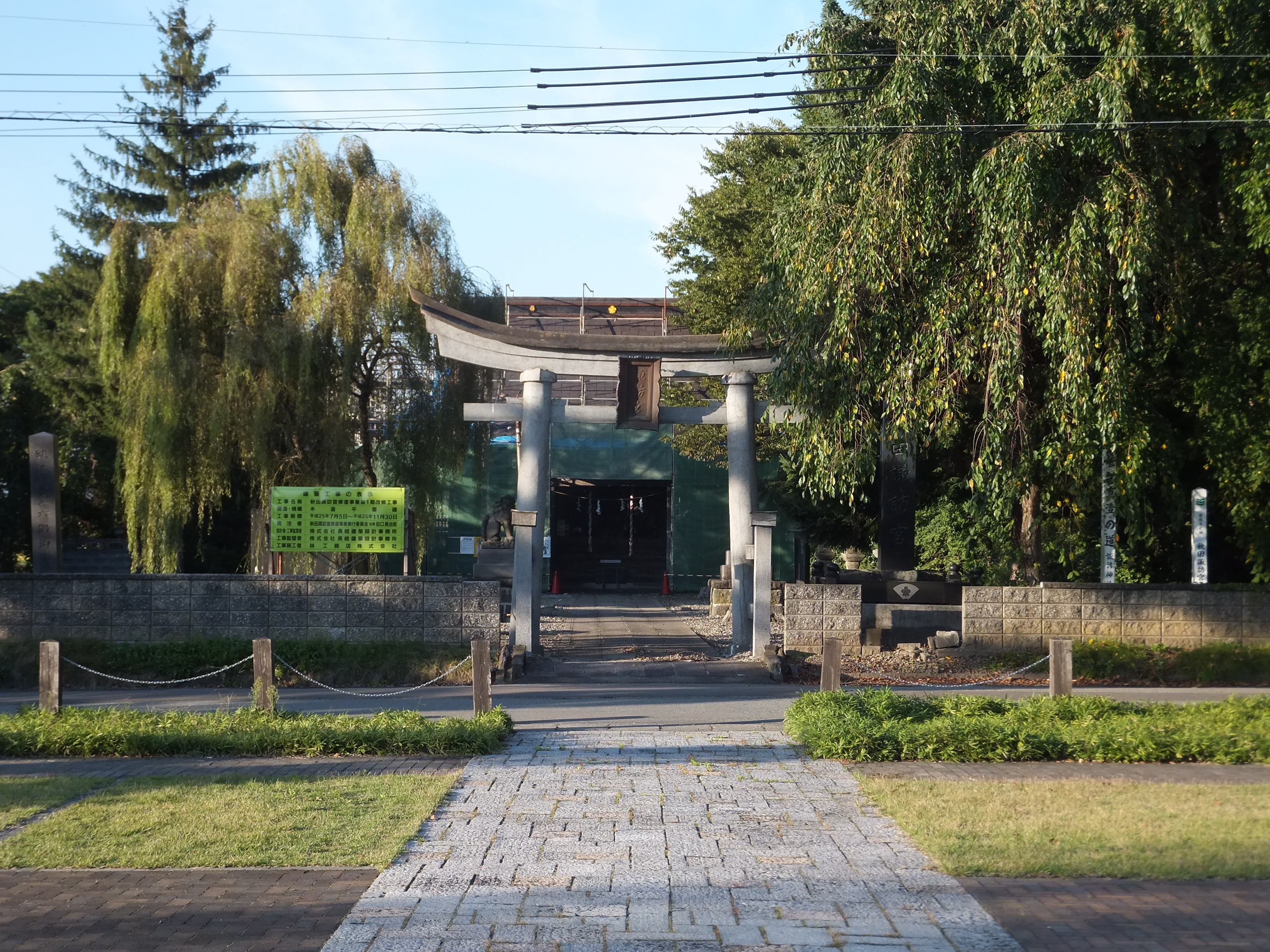 秋田諏訪宮（秋田県美郷町）